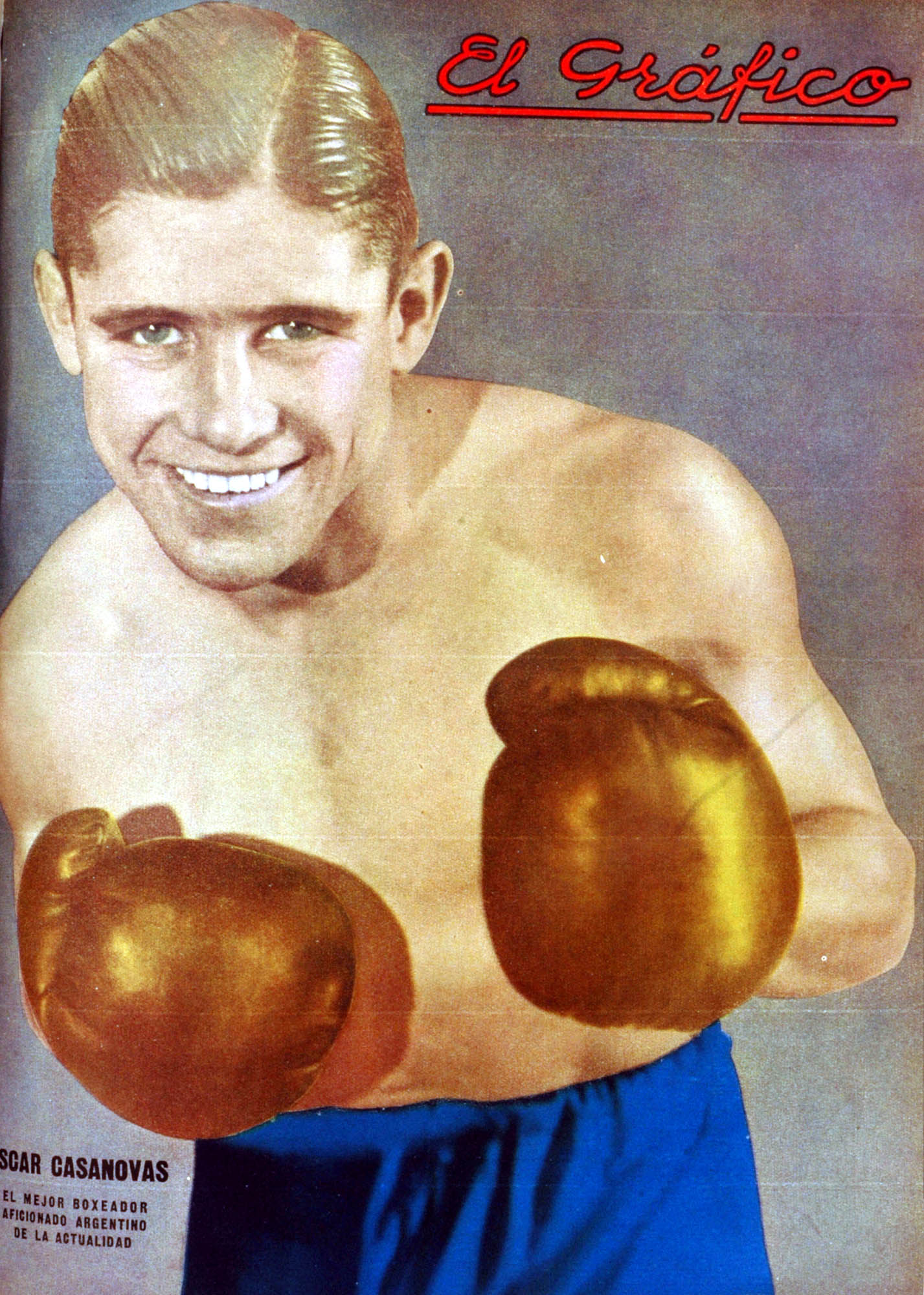 El Grafico del 20 de Julio de 1935. Edicion 836